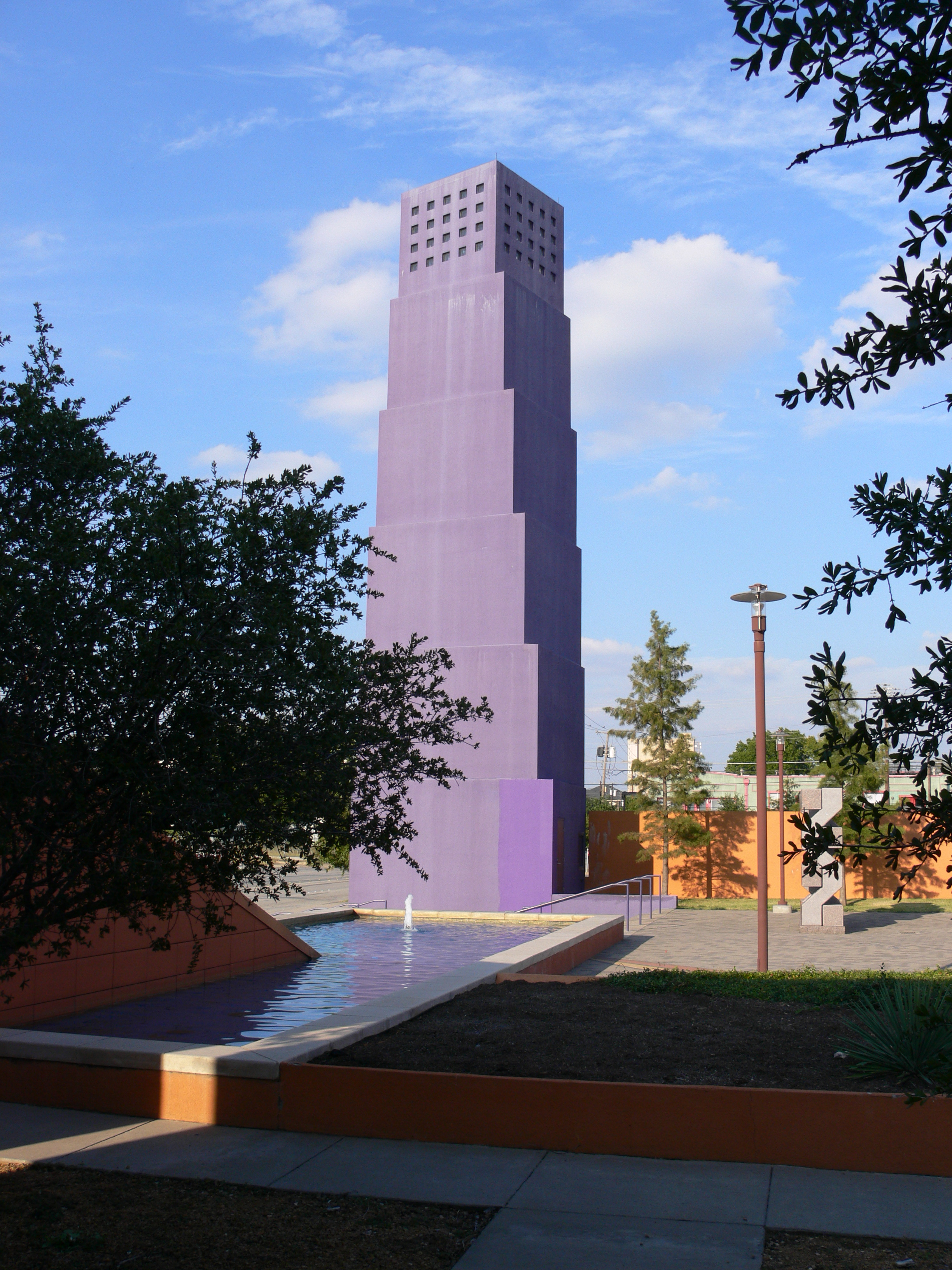 Latino Cultural Center, Dallas, Texas